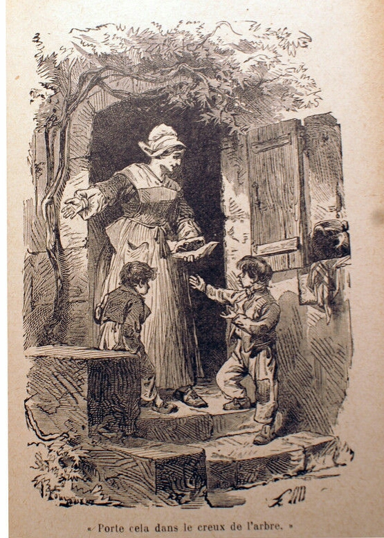 Comtesse de Ségur, L'Auberge de l'Ange gardien (1863), illustration de Foulquier. Bibliothèque rose.